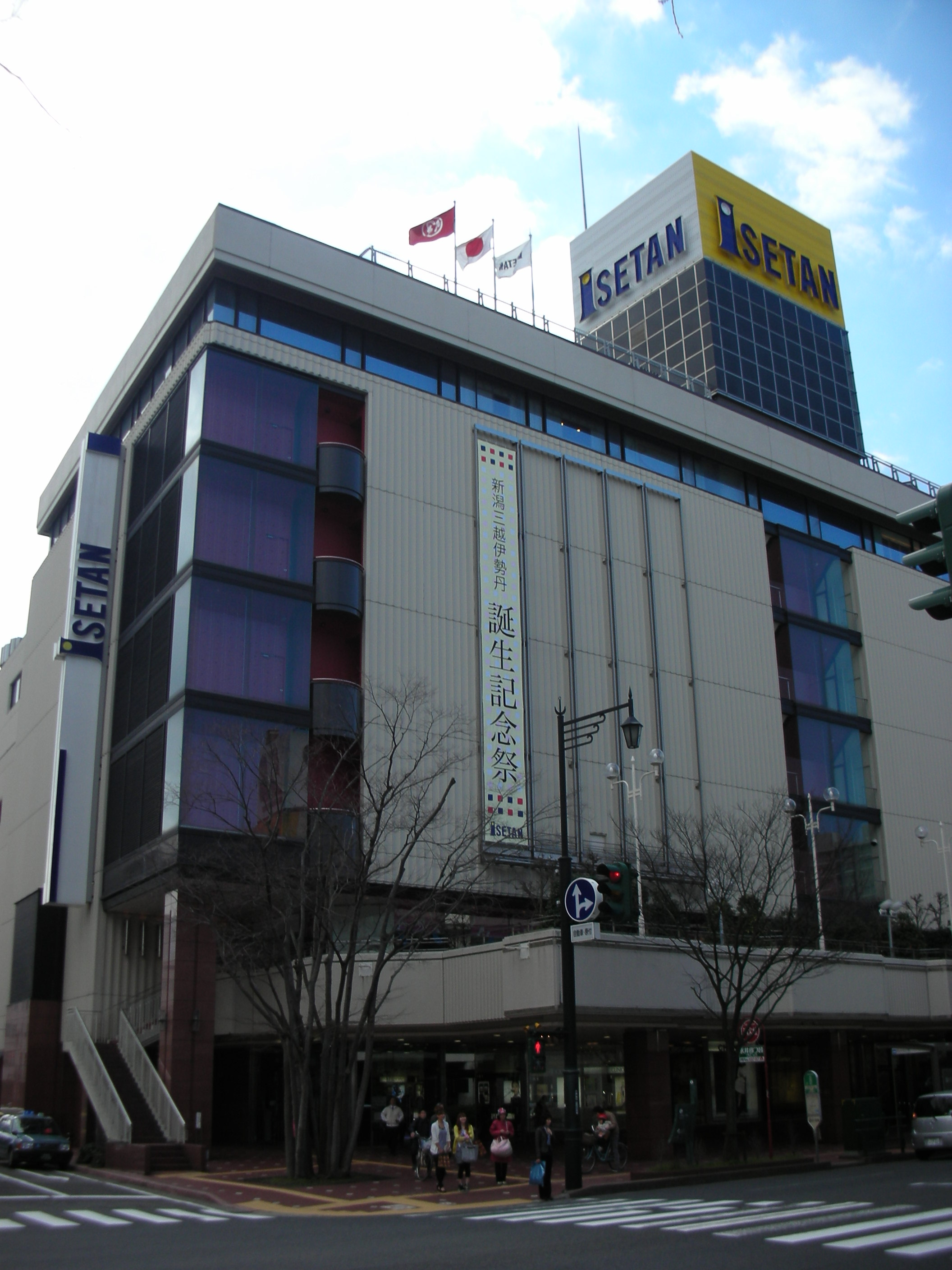 新潟伊勢丹の外観